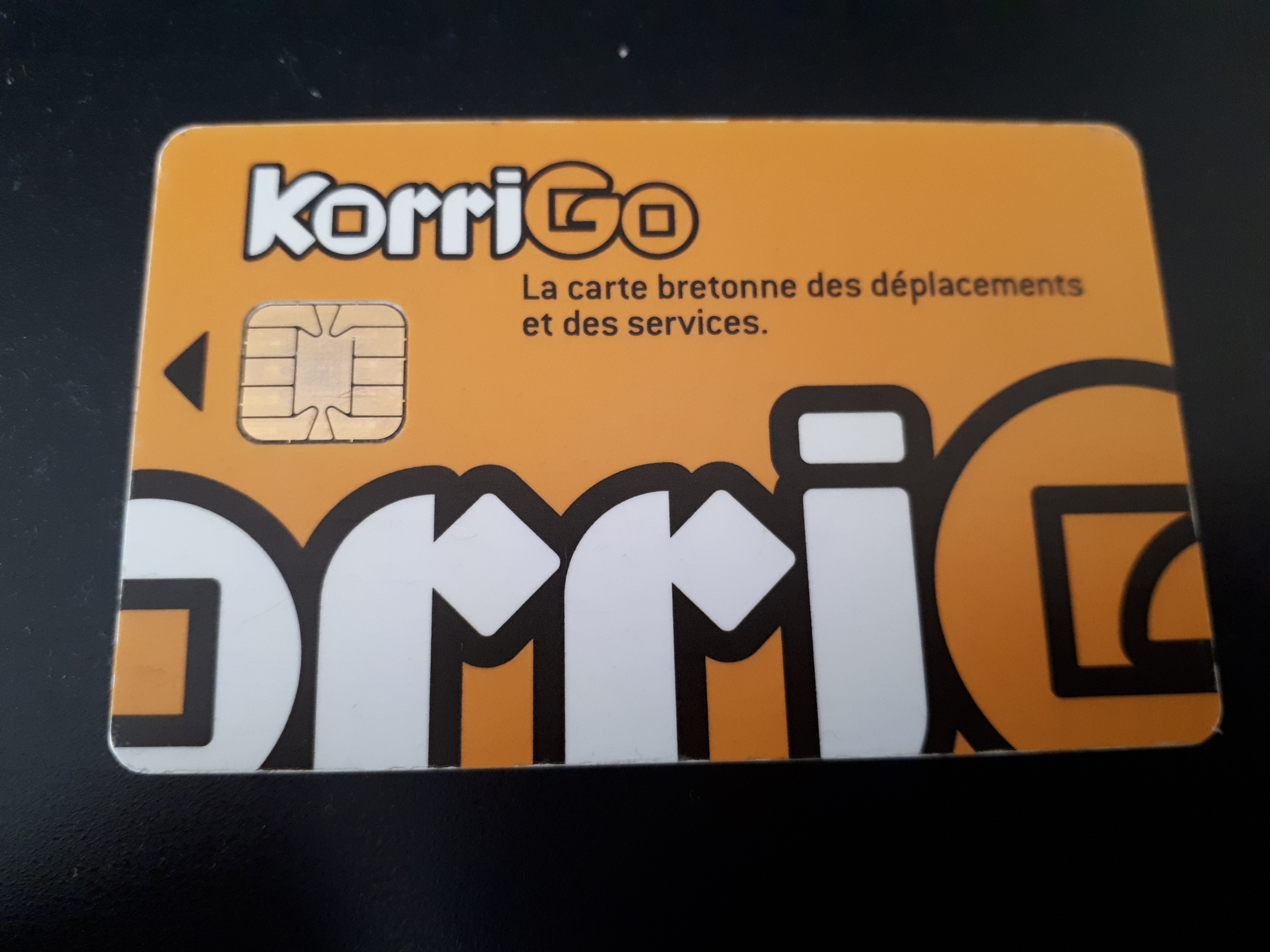 2éme version de la KorriGo adoptée depuis 2016.